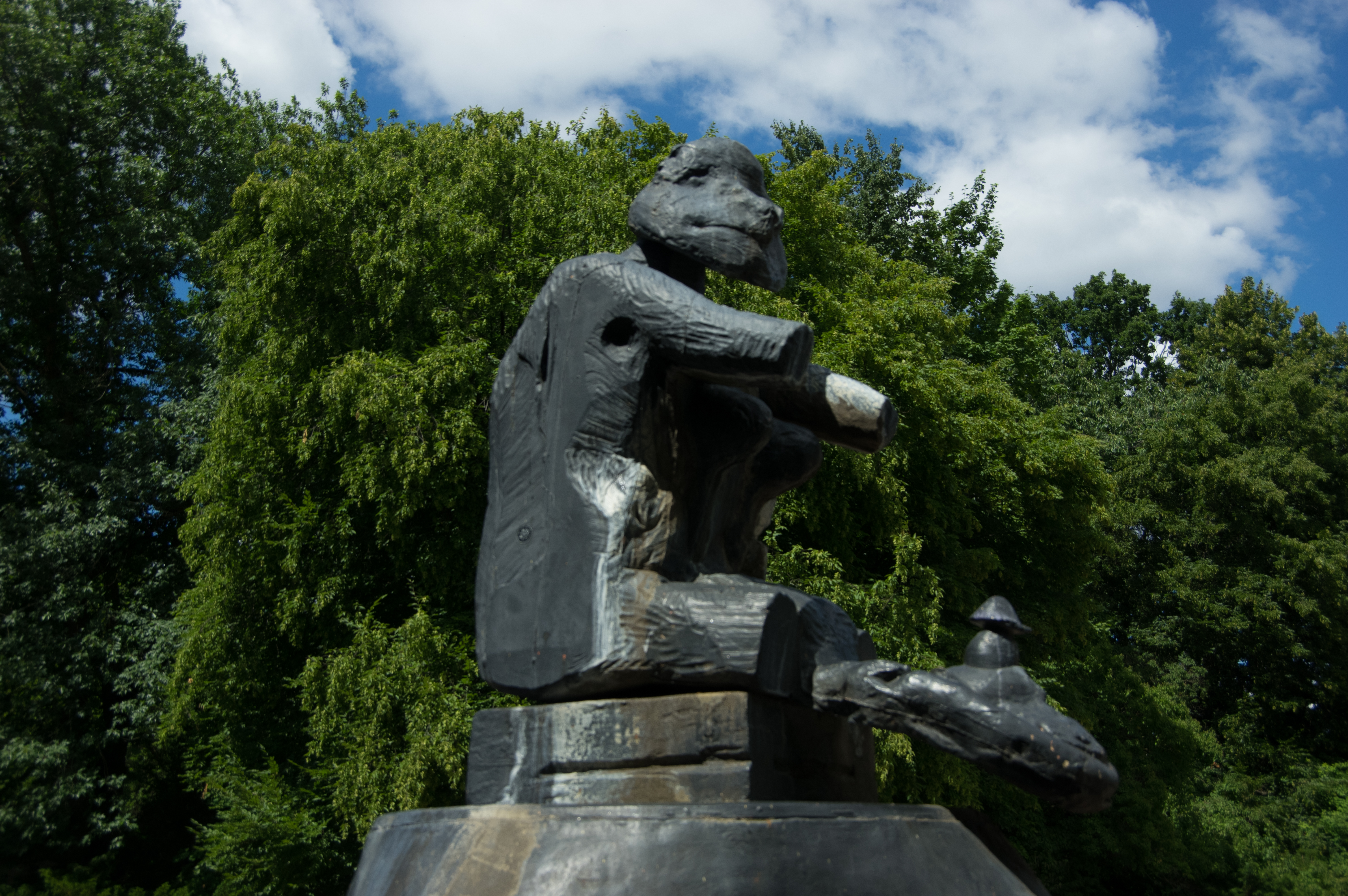 Berlin, Ortsteil Britz. Der Brunnen Fette Henne steht vor dem Eingang zjm Britzer Garten an der Buckower Allee. Erstelle wurde der Brunnen von Rolf Szymanski.